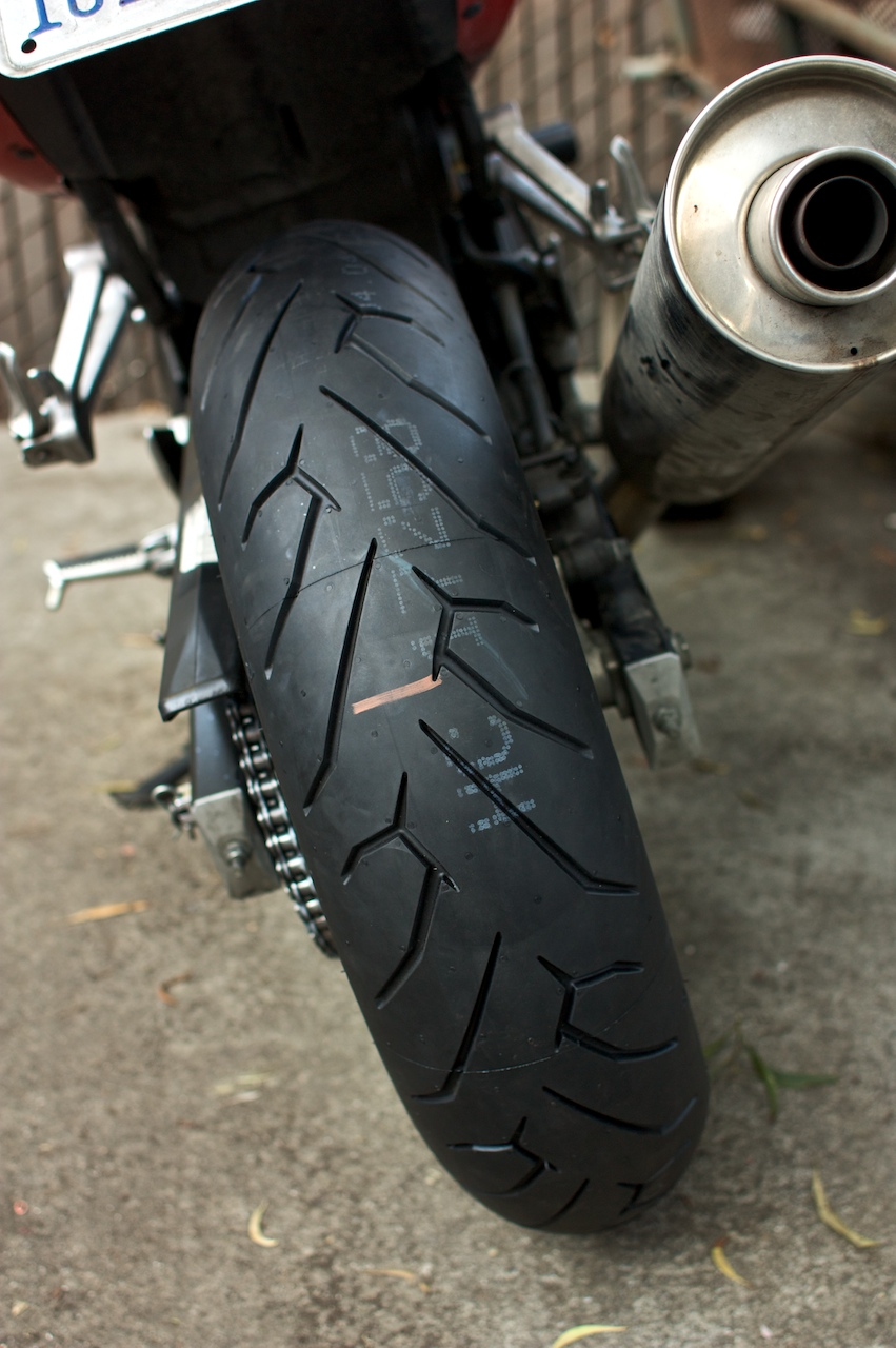 Pirelli Diablo Rosso motorcycle tyre